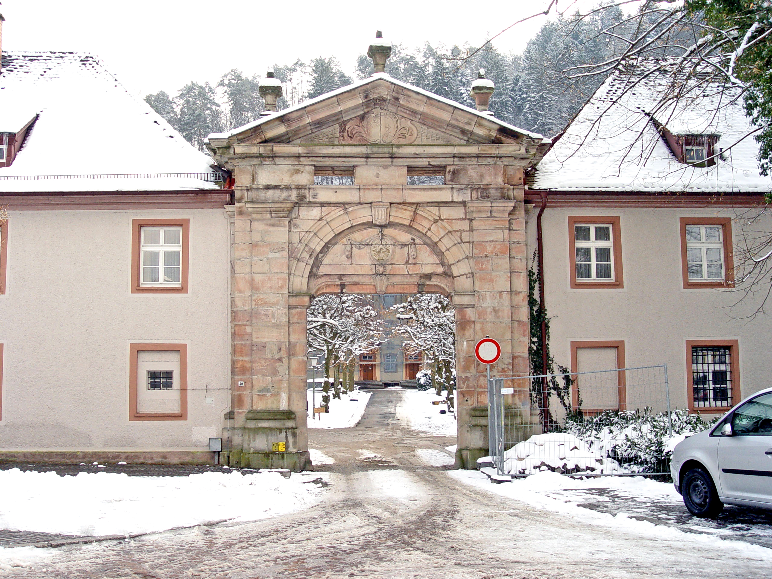 Sujet:Klouschter Lichtenthal Agankspaart Source:Eege Foto vum Martin Dürrschnabel